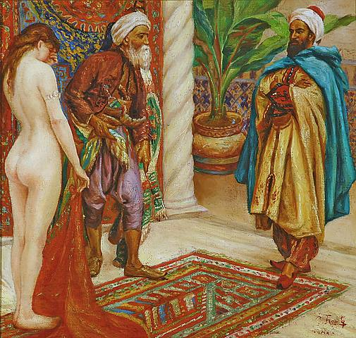 Une nouvelle arrivée.